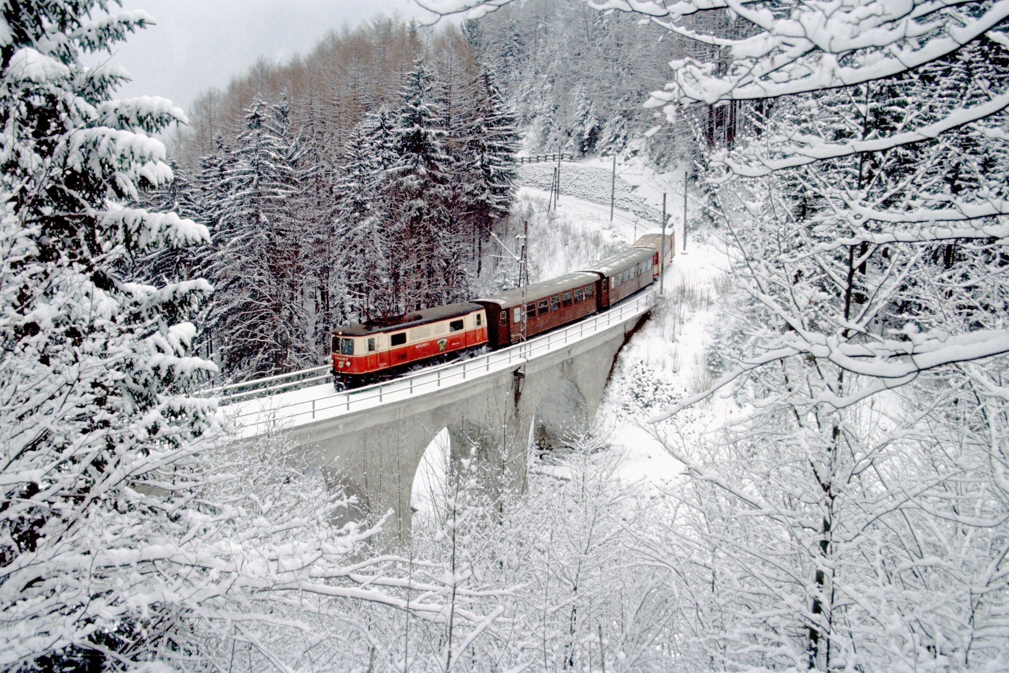 de: Winterbetrieb auf der Mariazellerbahn, Regionalzug auf dem Heugrabenviadukt bei Puchenstuben en: Winter on the Mariazellerbahn, regional train passing the Heugraben viaduct near Puchenstuben station